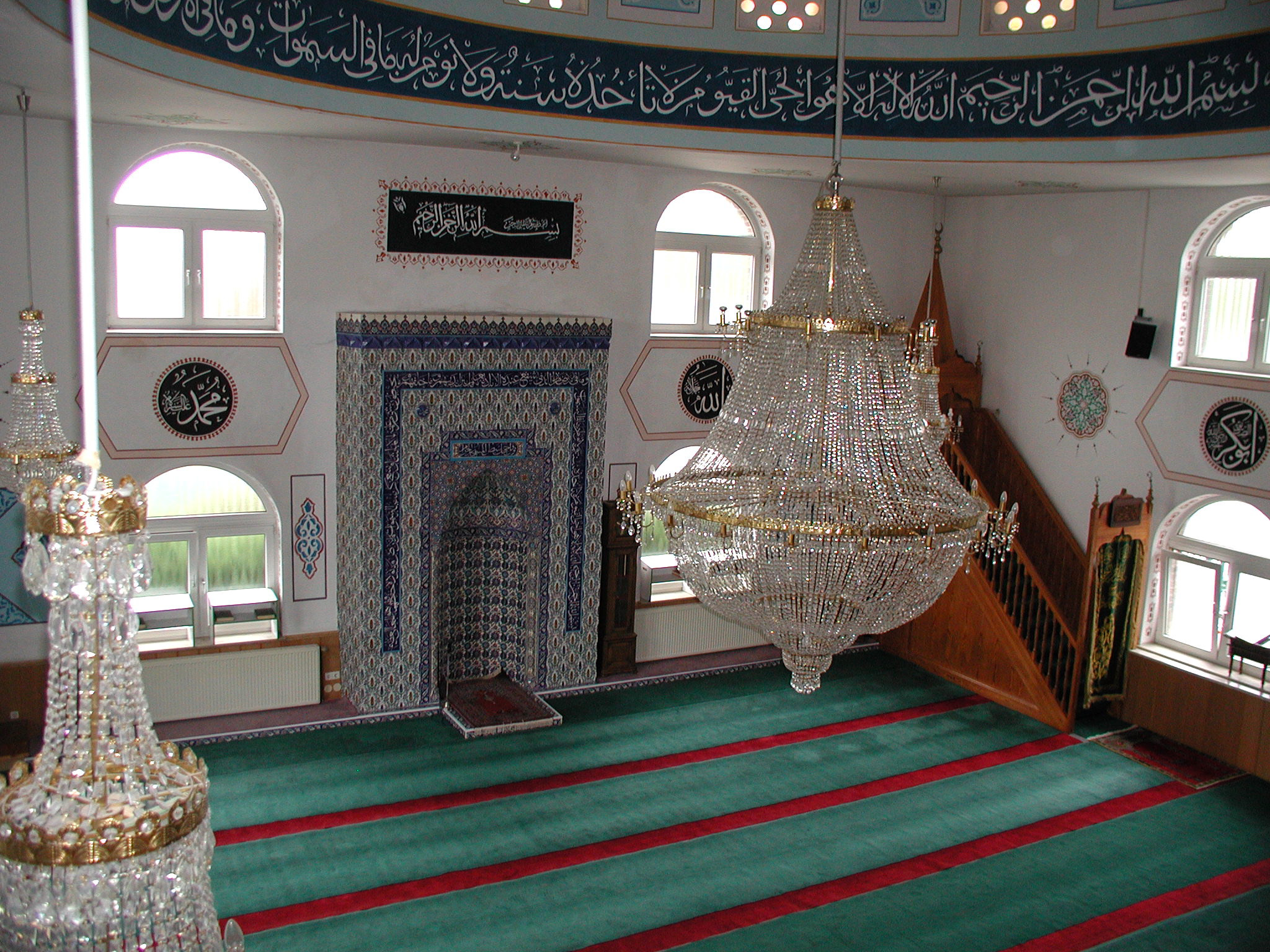 Moschee Wesseling, Mimar–Sinan-Camii